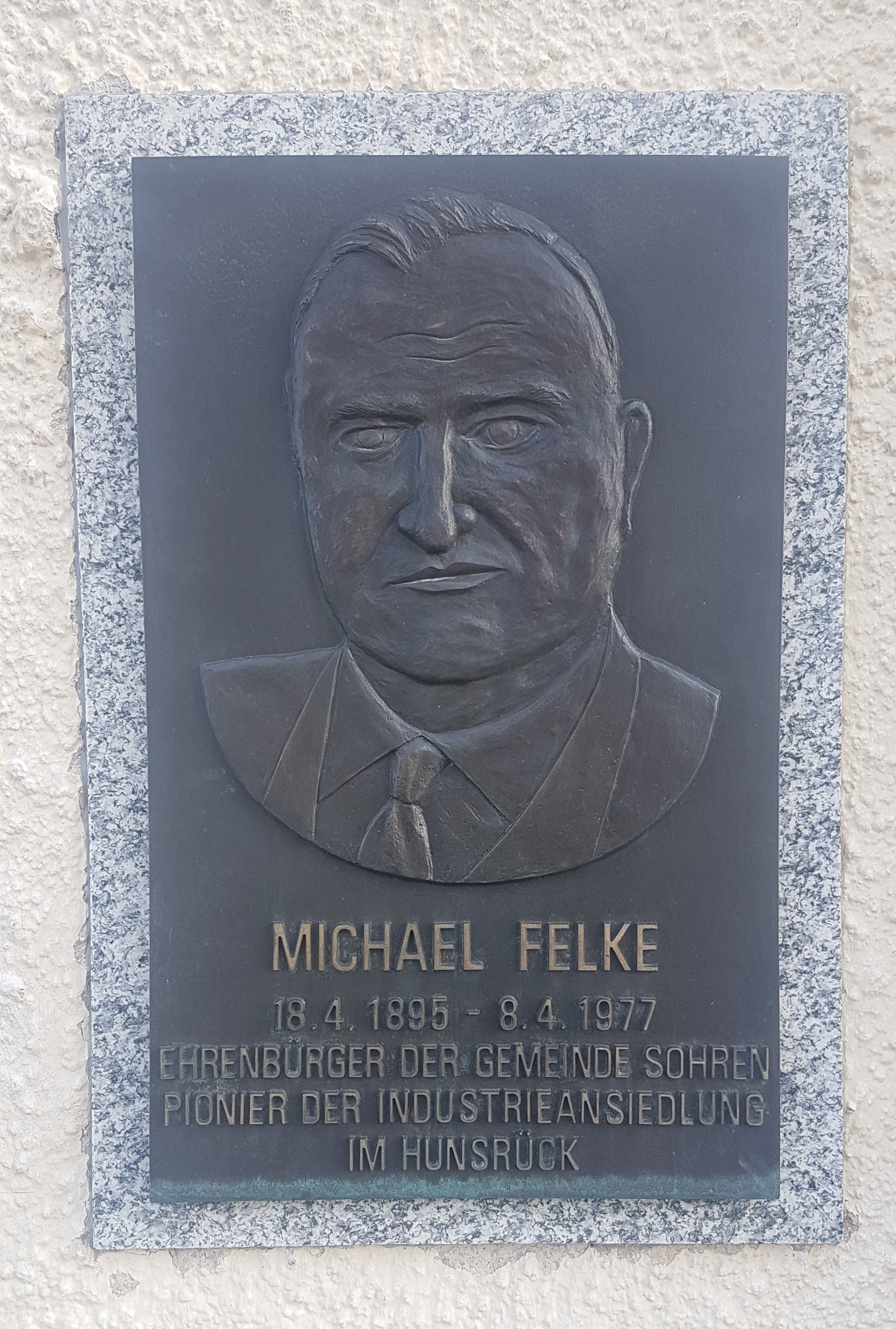 Michael -Felke-Gedenktafen